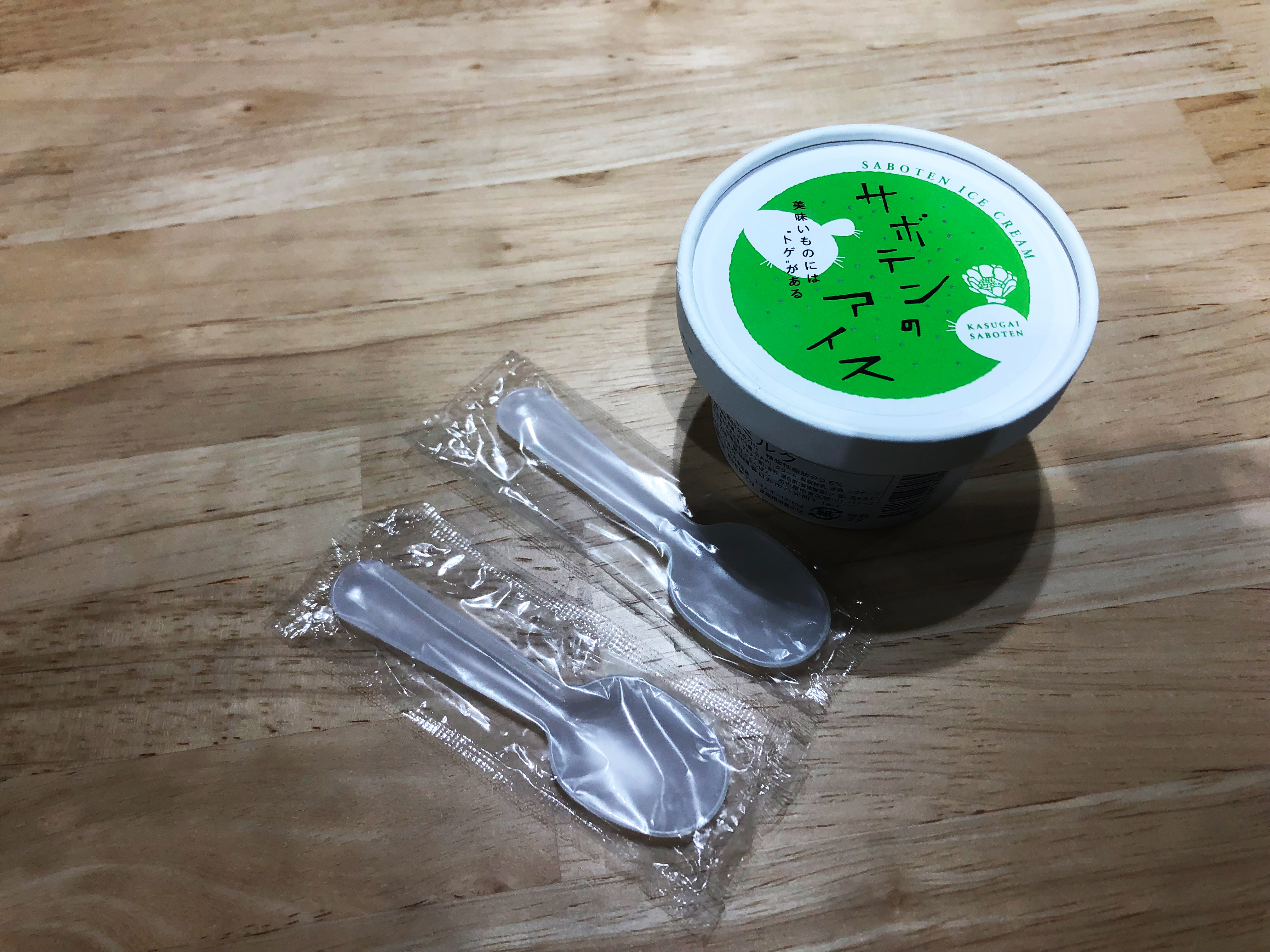 サボテンの粒が入ったココナッツ風味のアイス